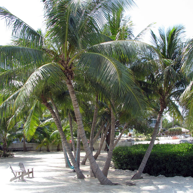 Florida Keys Coconut Palm (Cocos nucifera)